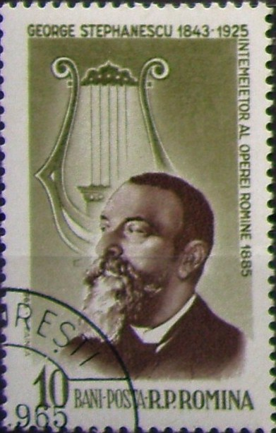 Source: Post of Romania